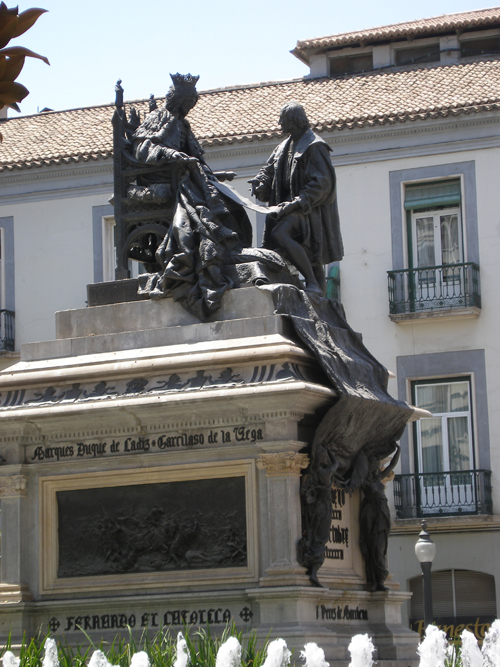 Plaza de Isabel la Católica, con el monumento a Colón y a la reina. Granada, España Isabel la Católica square, and monument to Columbus and Isabella, the Catholic Queen. Granada, Spain